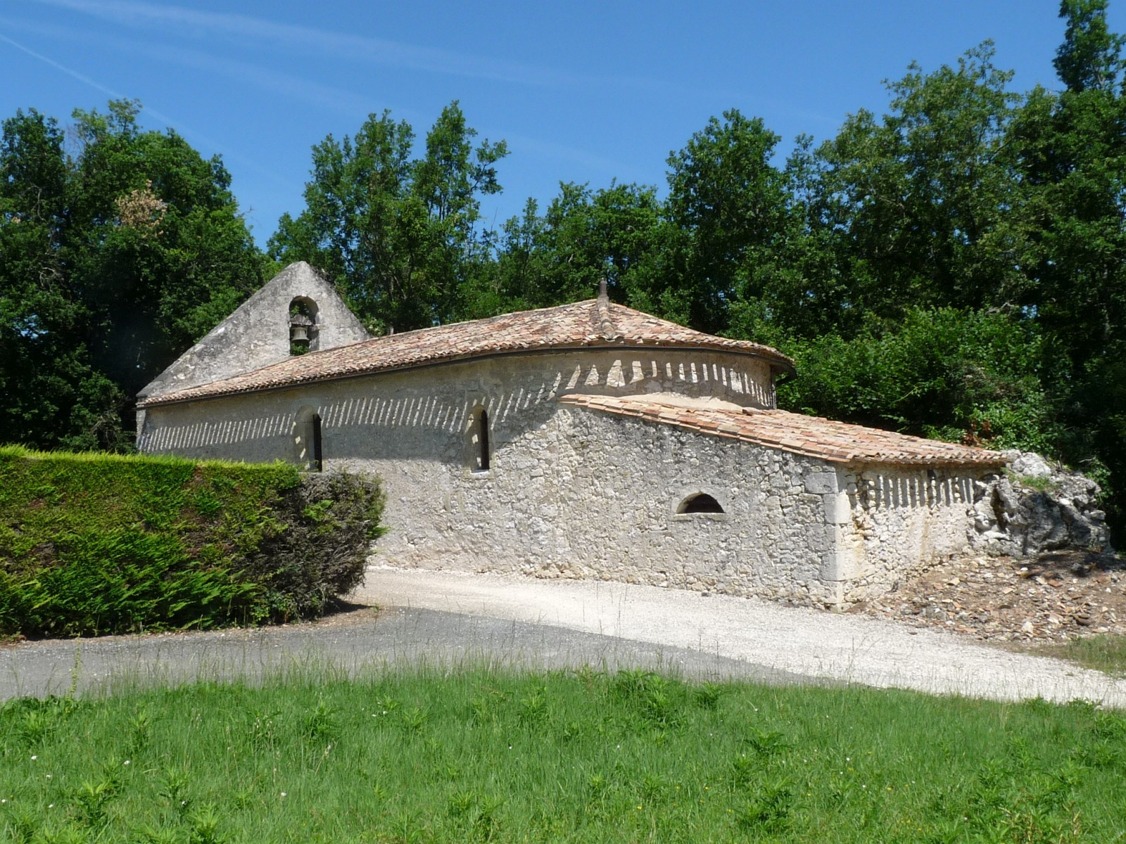 Eglise de St-Avit-de-Soulège, Gironde, France